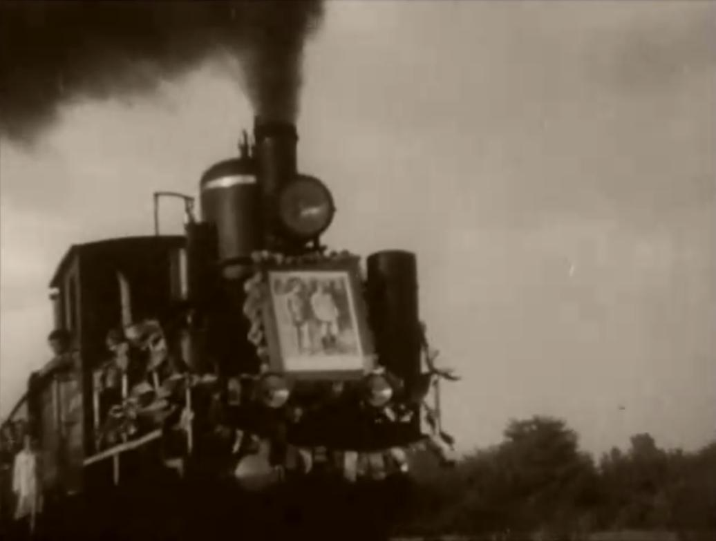 Кадр из киножурнала 1937 года, посвящённого открытию Мелитопольской детской железной дороги им. Лазаря Кагановича